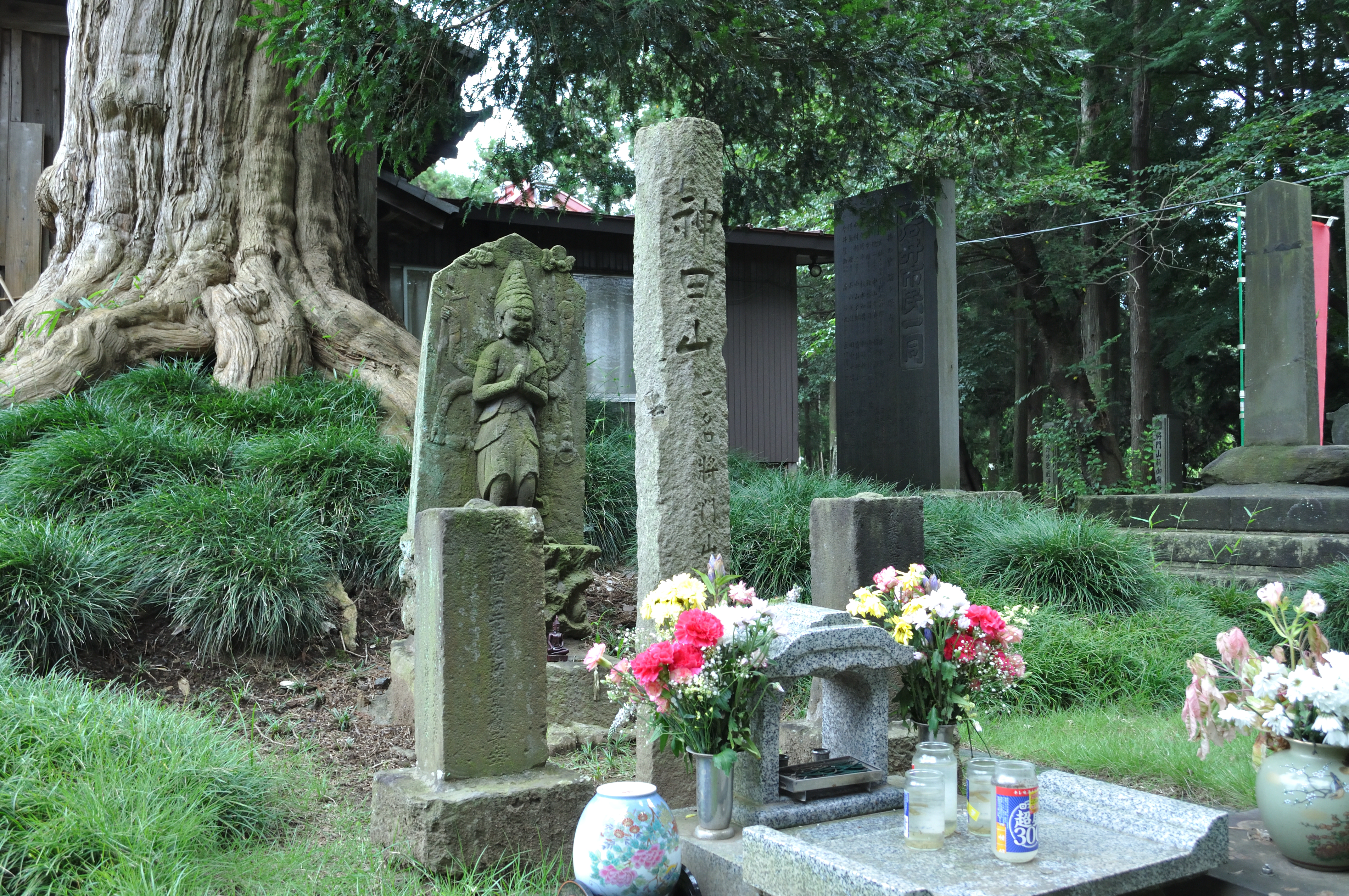 坂東市、延命院にある平将門の胴塚